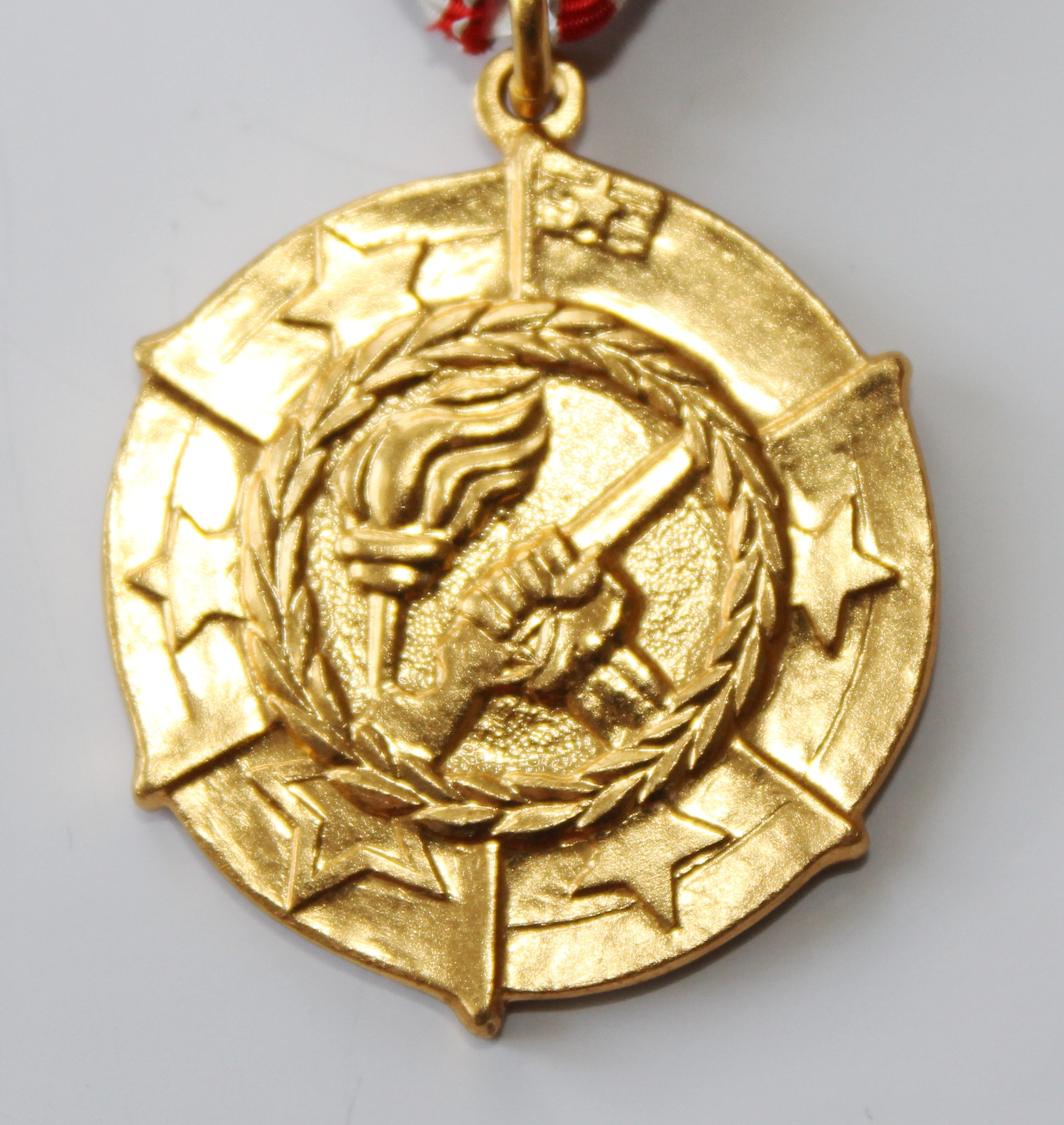 Спомен-медаља поводом тридесетогодишњице победе над фашизмом, 1975. година (предња страна)